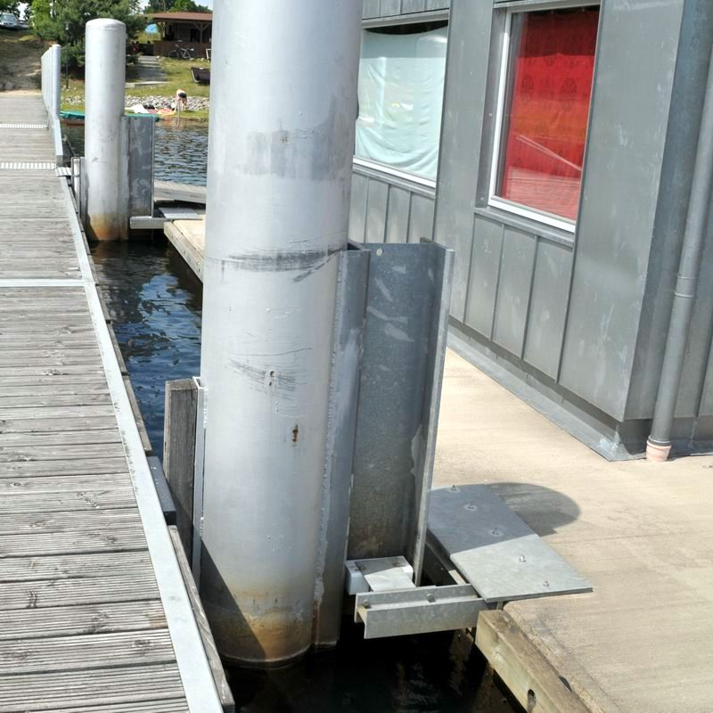 Schwimmhaus Befestigung